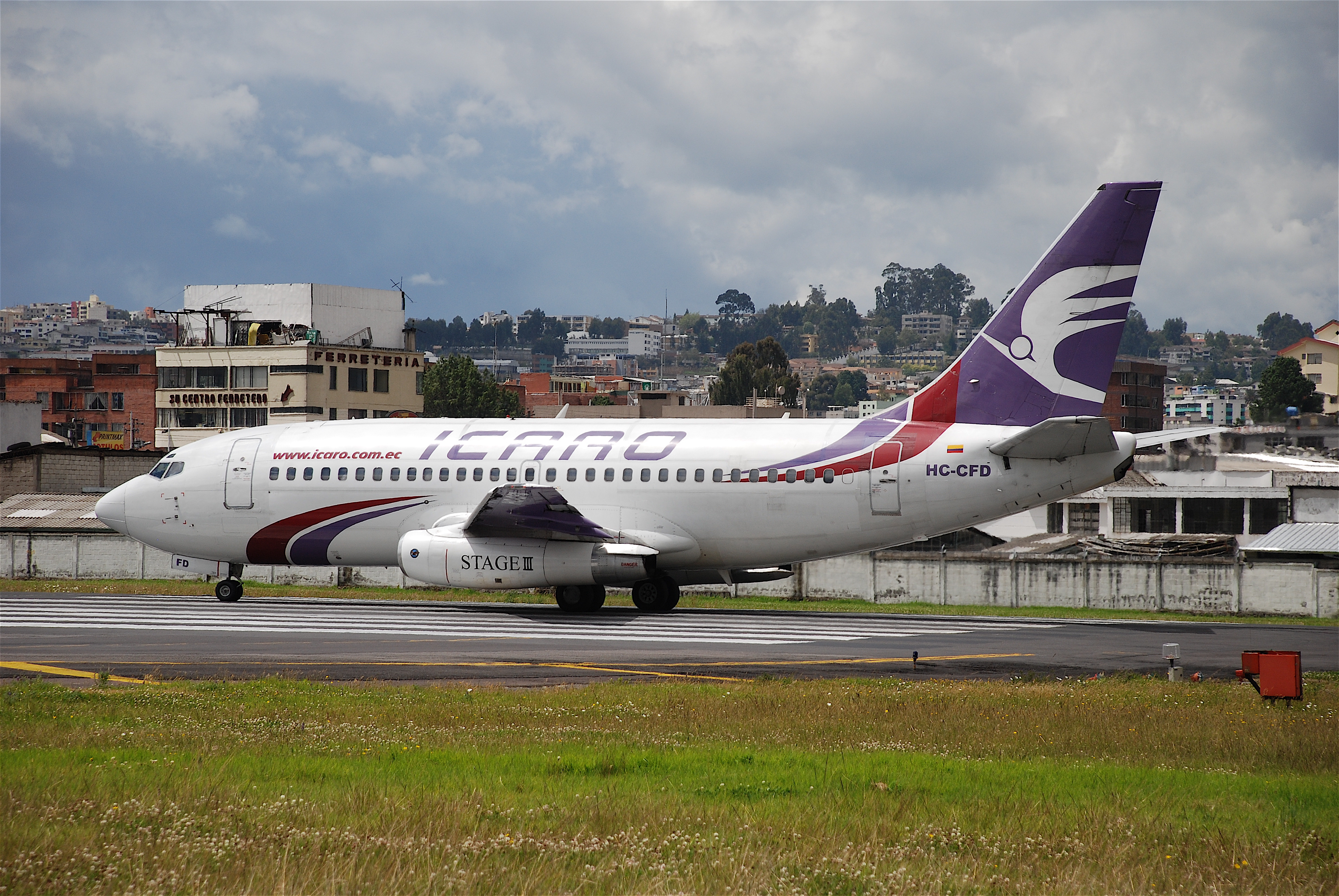 HC-CFD@UIO;23.06.2008/515bn